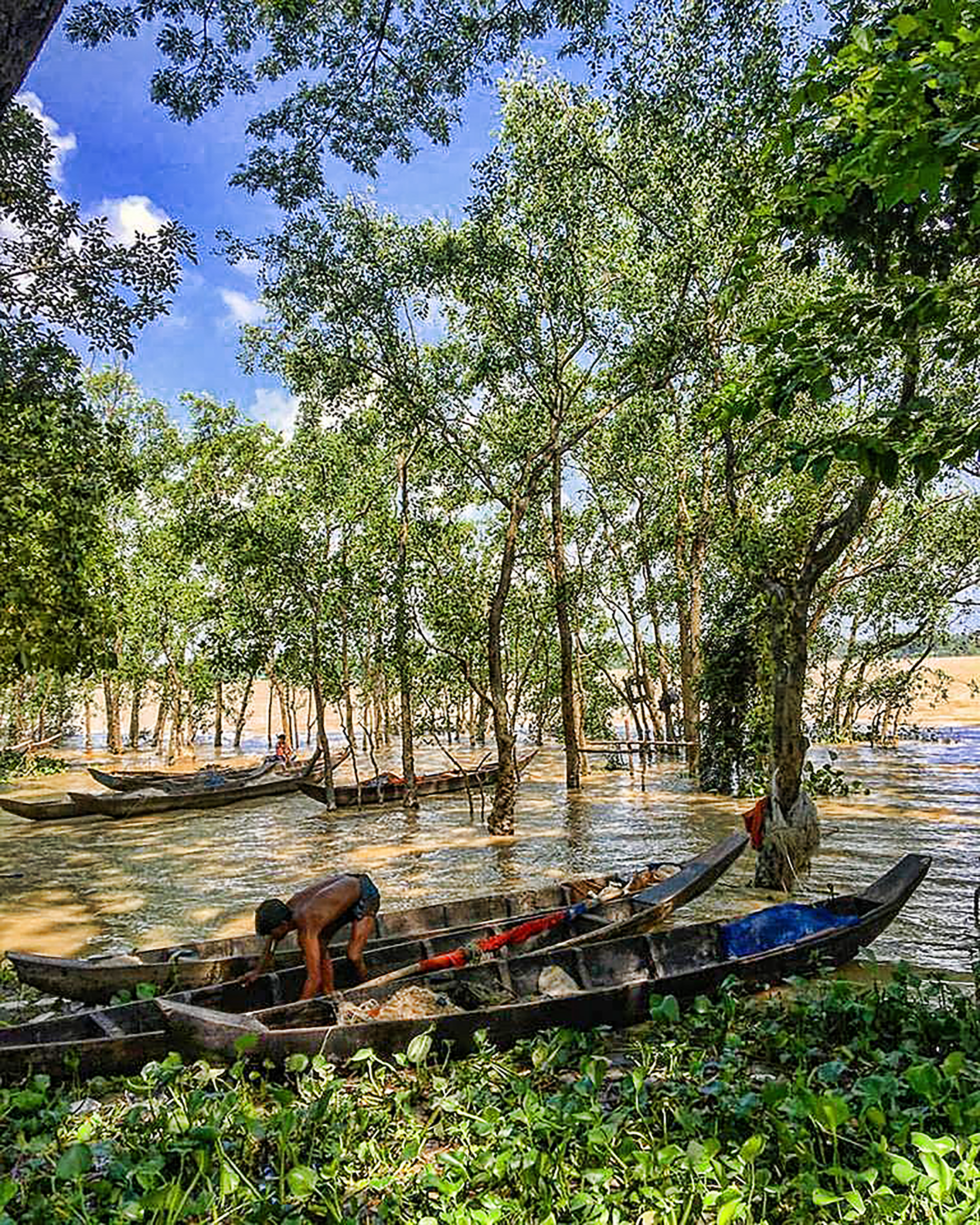 চুনাতি বন্যপ্রাণী অভয়ারণ্য